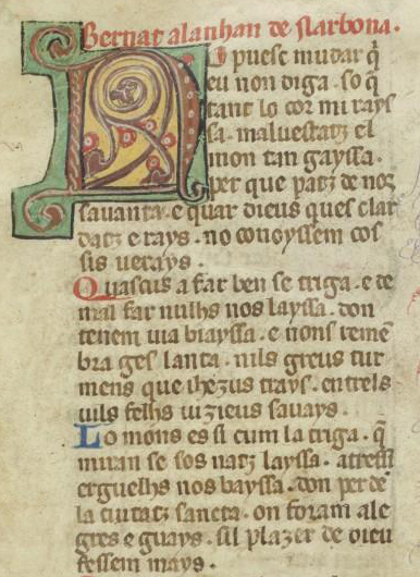 Détail du manuscrit de la BNF Français ms. 856 f. 383v concernant le troubadour Bernat Alanhan de Narbona